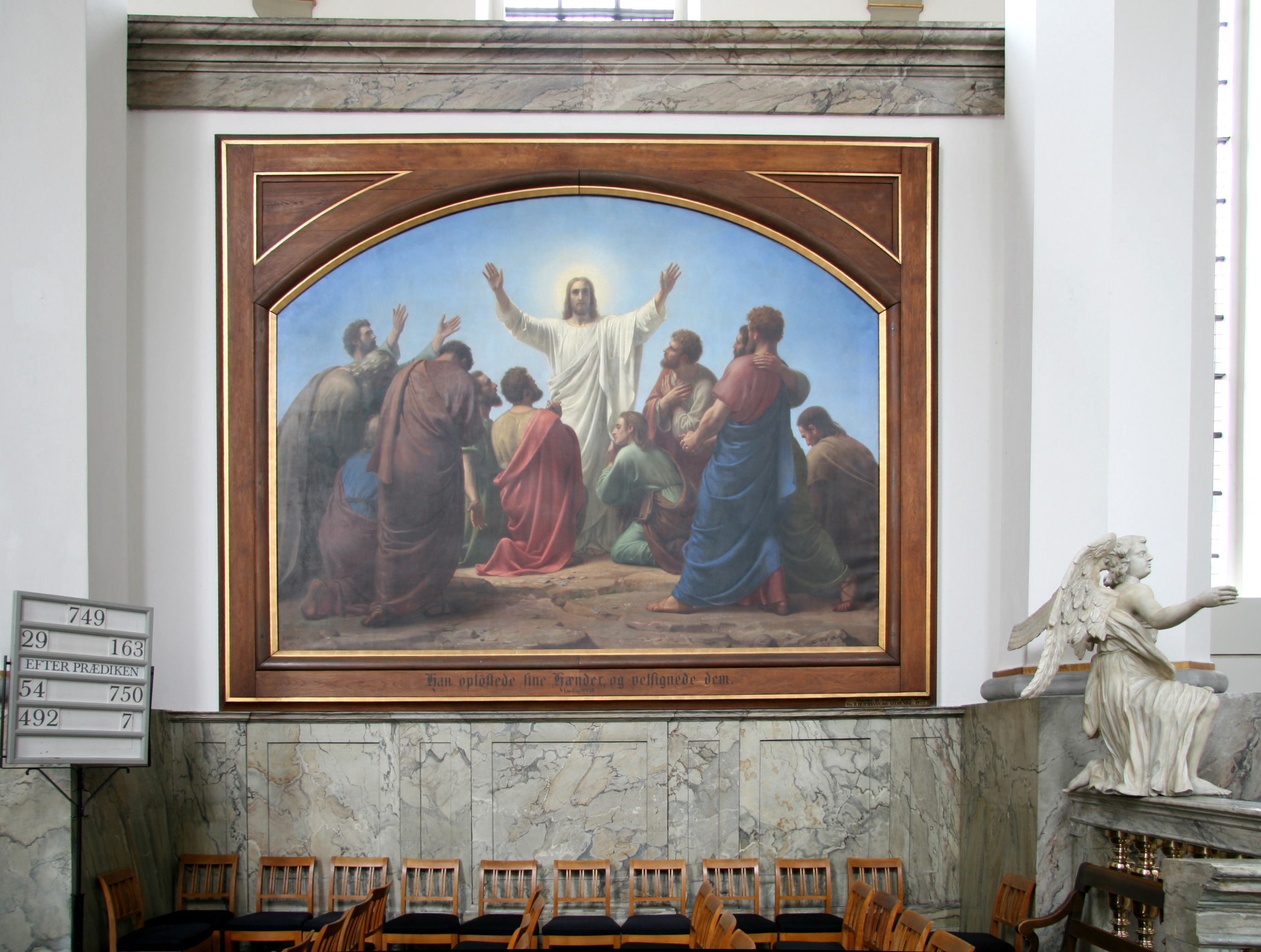 Trinitatis Kirke, Copenhagen, Denmark. "Velsignelsen" (en: Blessing, de: Segen). The inscription quotes Luke 24:50. Anton Dorph. 1873.